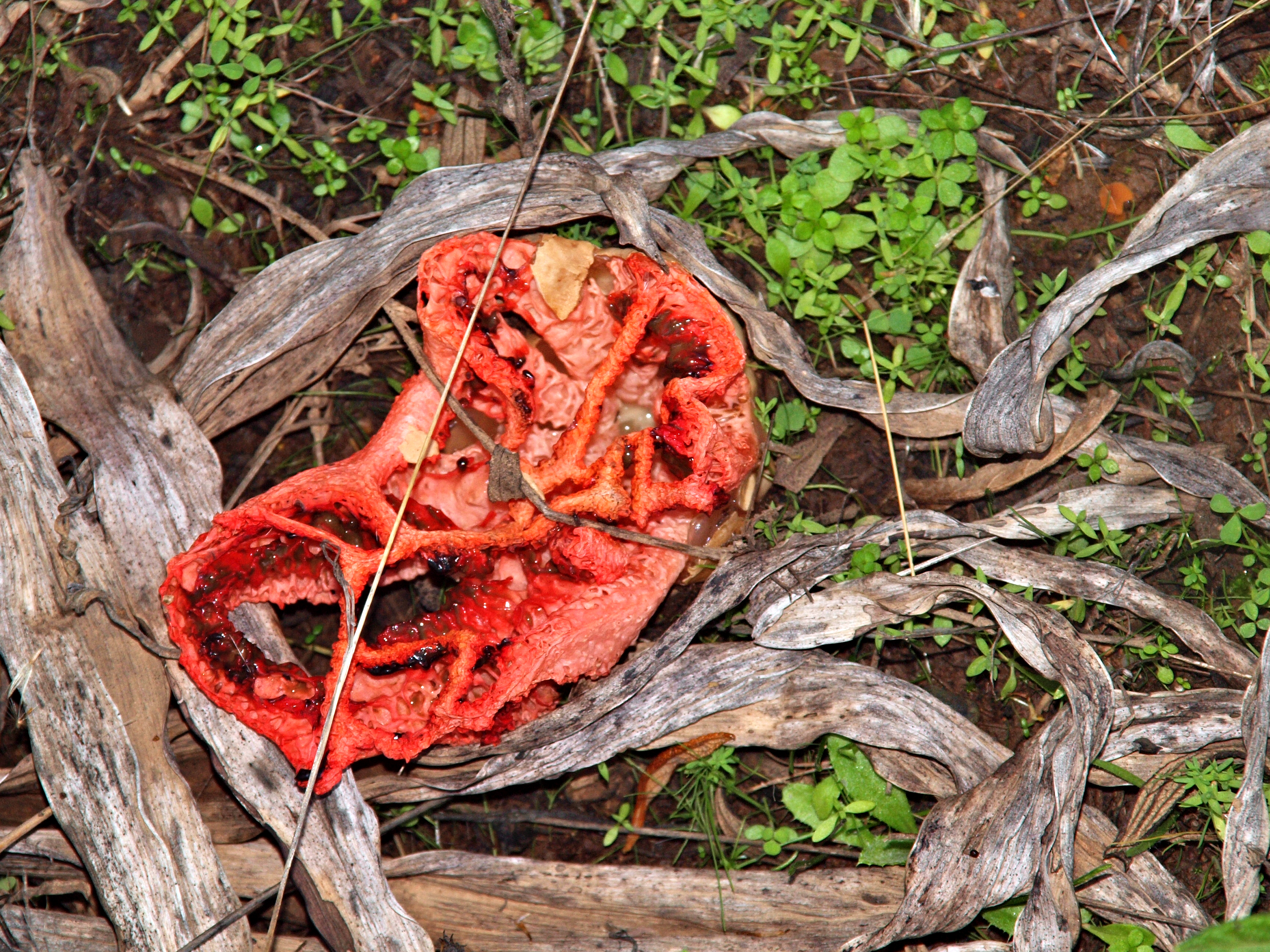 Manso (Corse) - Clathre rouge (Clathrus ruber) en bordure du Fango